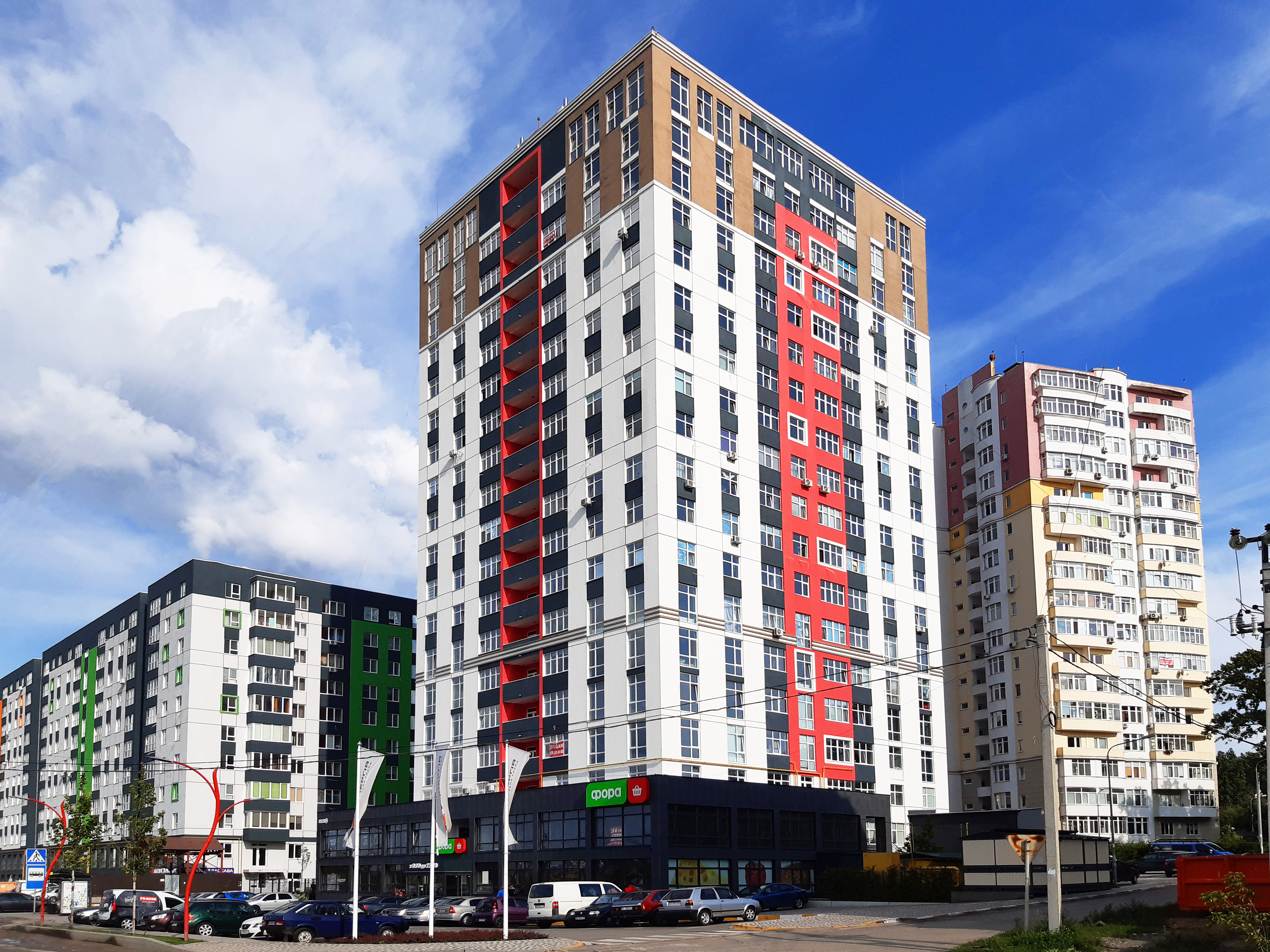 ЖК «Синергія 3», 2-й супермаркет «Фора». Урочище Пилипів Потік. Ірпінь